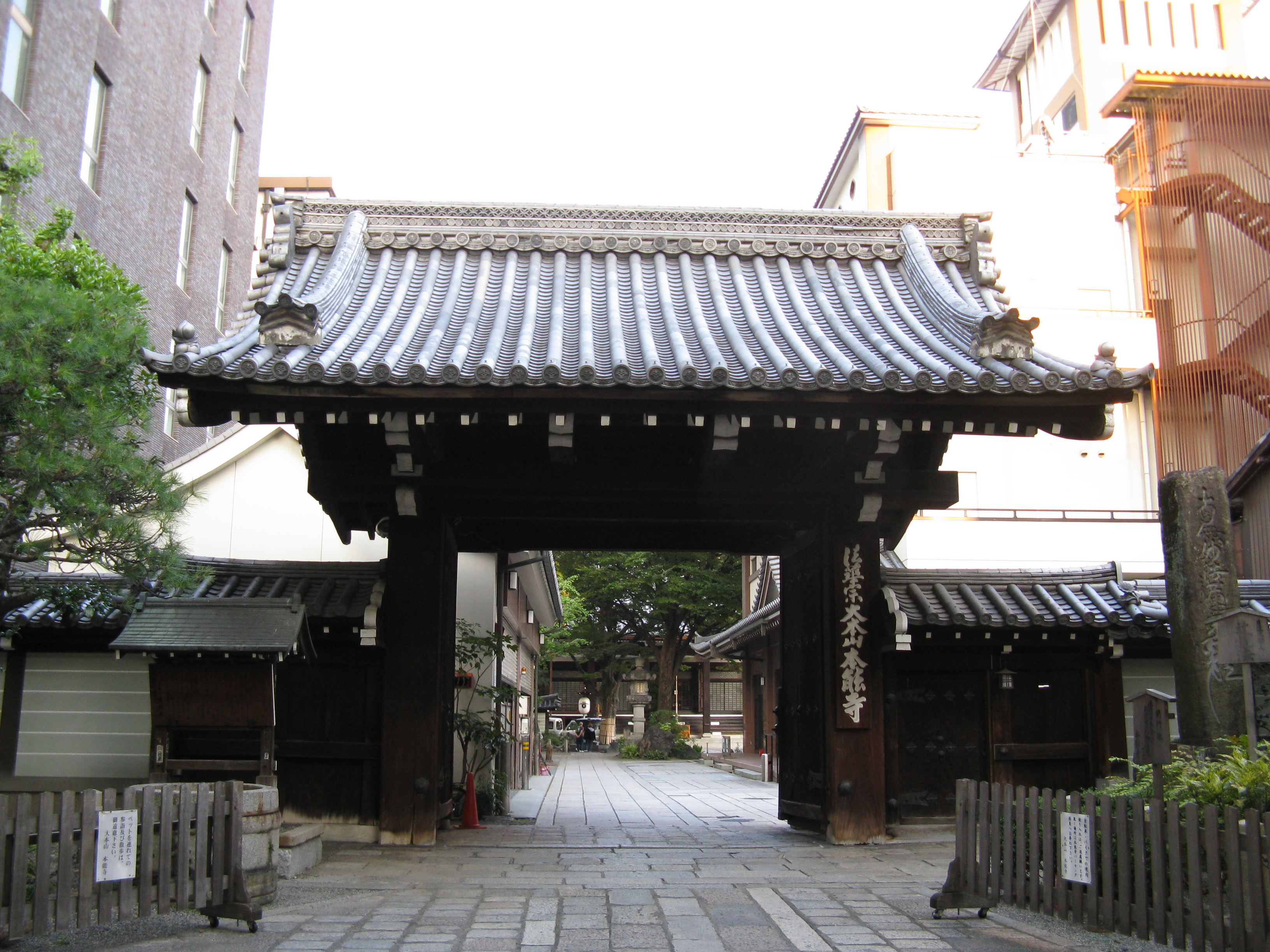 本能寺 山門